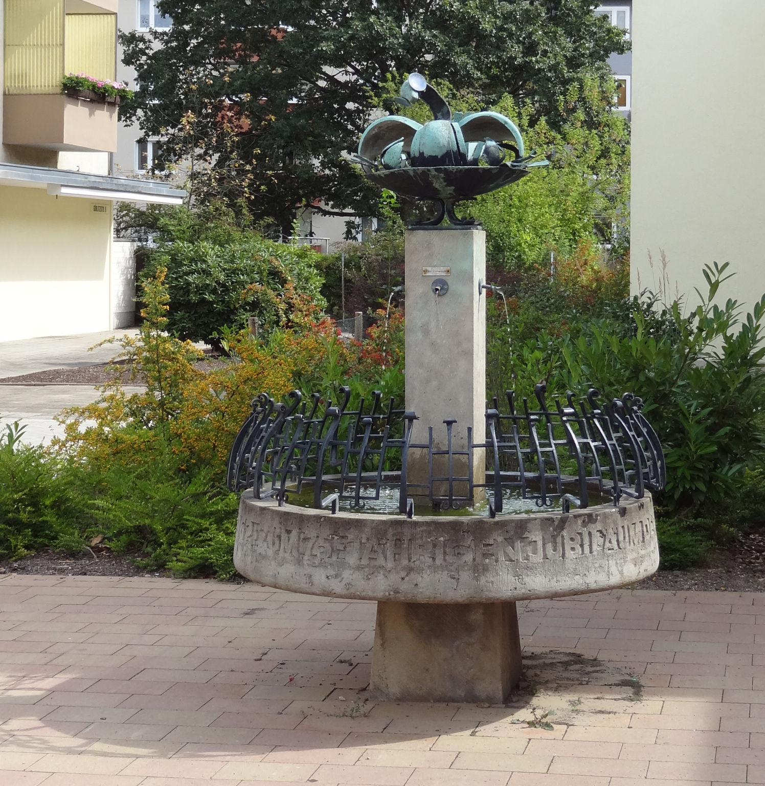 Brunnen mit Figur "Schwanennest mit Jungen" Standort nördlich des EKZ-Görlitzstrasse in Braunschweig-Melverode